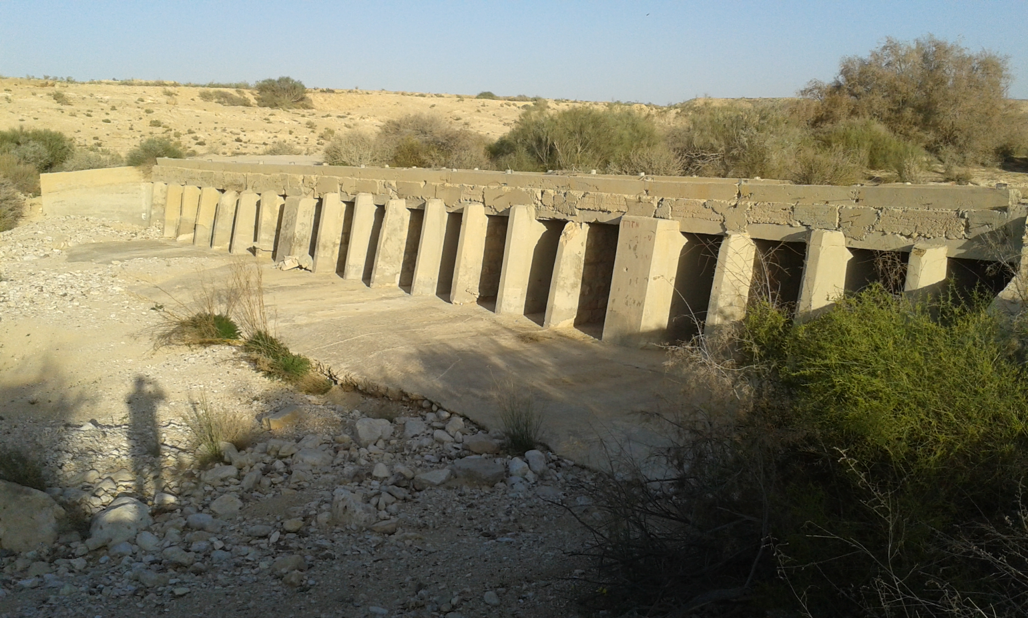 הגשר הבריטי בערוץ נחל לבן. הכביש הישן לניצנה